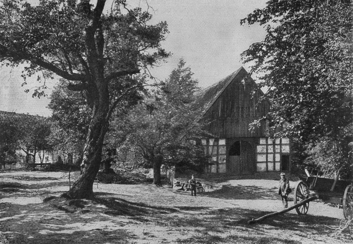 Originalbeschreibung „Gehöft in Linnenbeke bei Vlotho“. – Nordrhein-Westfalen, Deutschland.